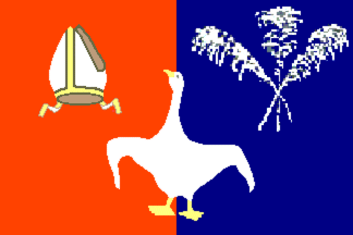 Prapor obce Mikulůvka